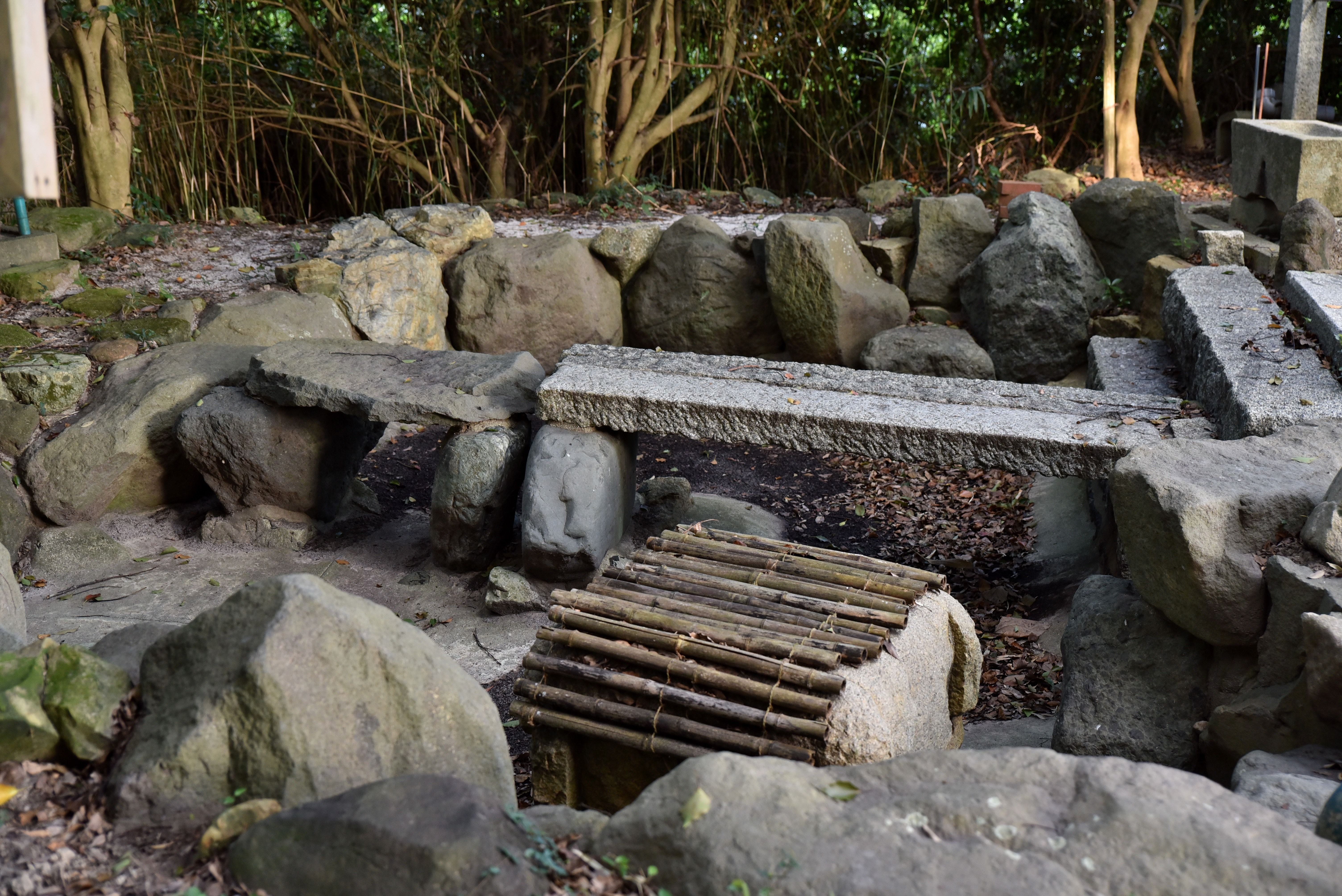 源義朝が打ち取られた湯殿跡